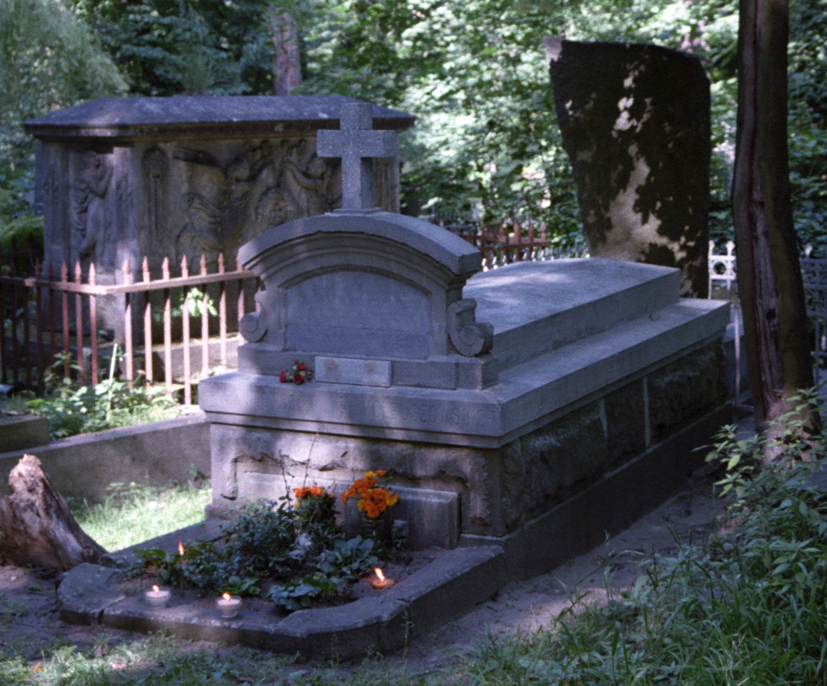 Grobowiec Kolbuszowskich na Cm. Łyczakowskim we Lwowie. Zdjęcie wykonane w lipcu 1994 r. W grobowcu pochowani są też Dzikowscy.